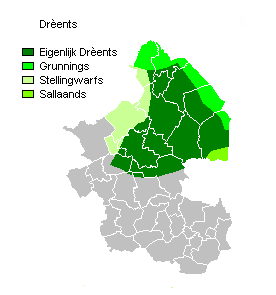 Made by nds-Gebruker:Grönneger 1